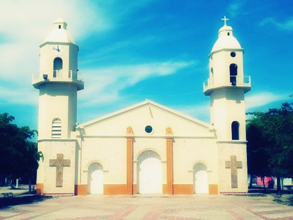 La Iglesia Inmaculada Concepcion